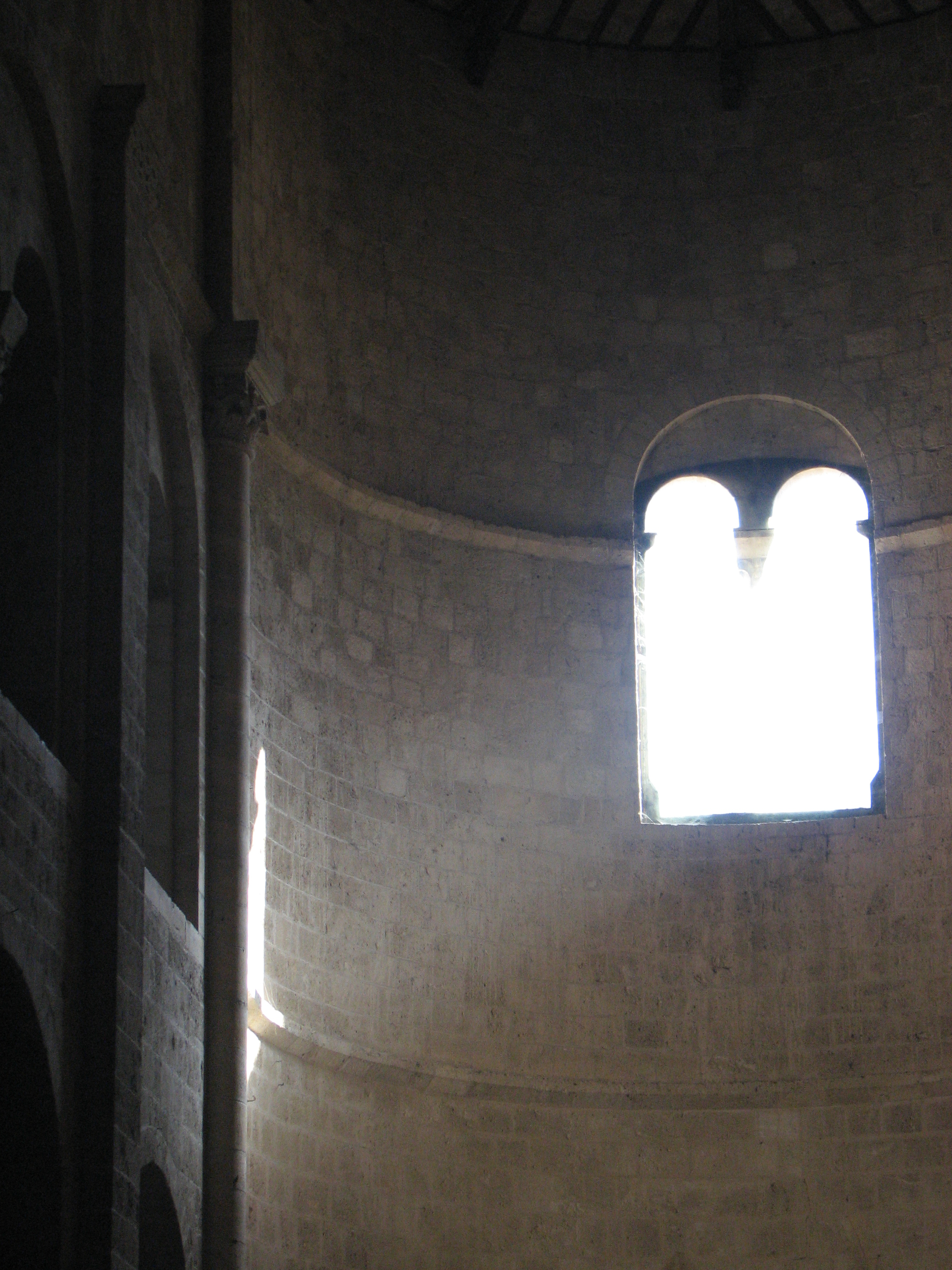 L'Abbazia di Sant'Antimo (Montalcino, Toscana, Italy) - Finestrone dietro l'altare maggiore